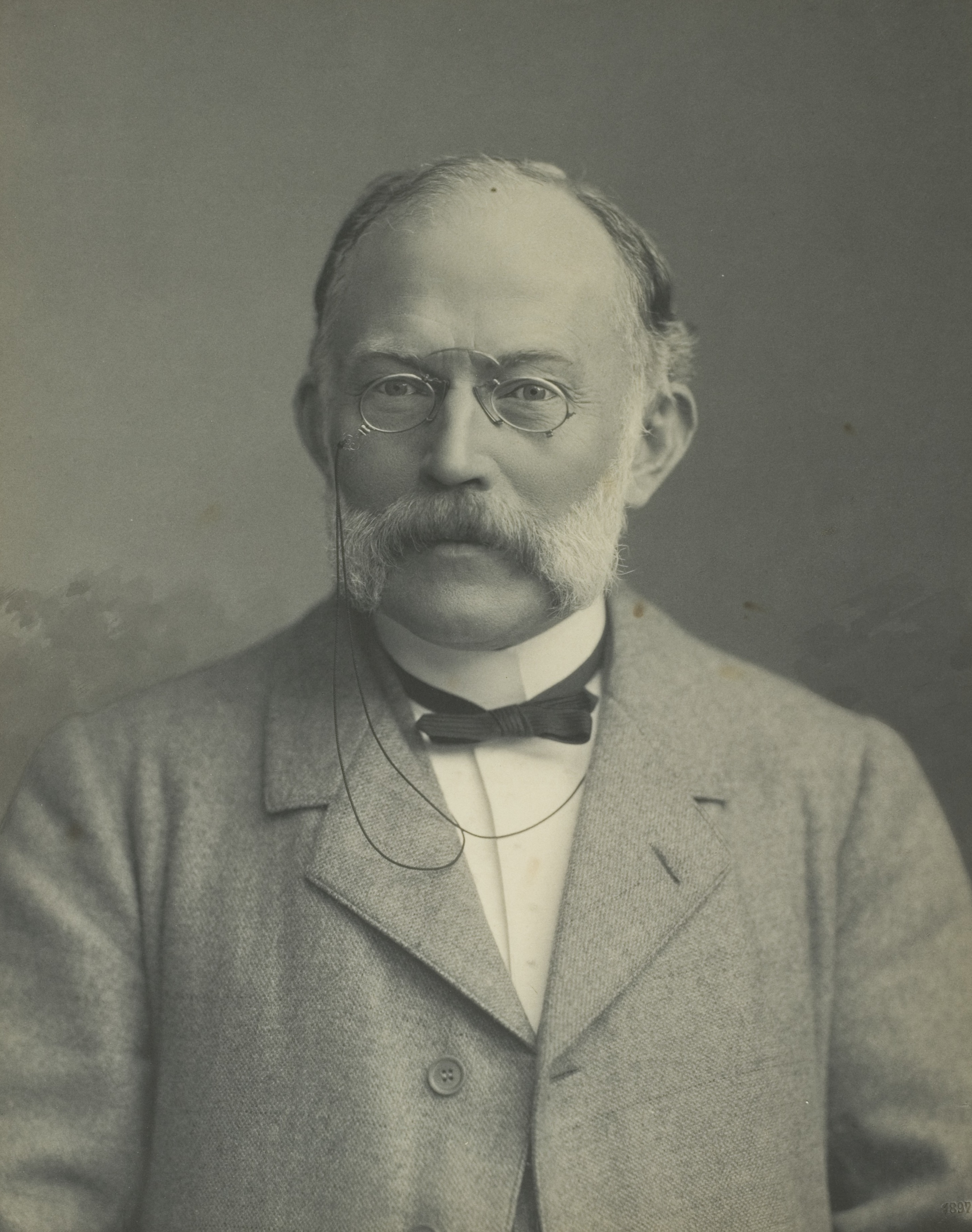 Ferdinand Adolf Kehrer, Gynäkologe, 1881–1914 Professor in Heidelberg